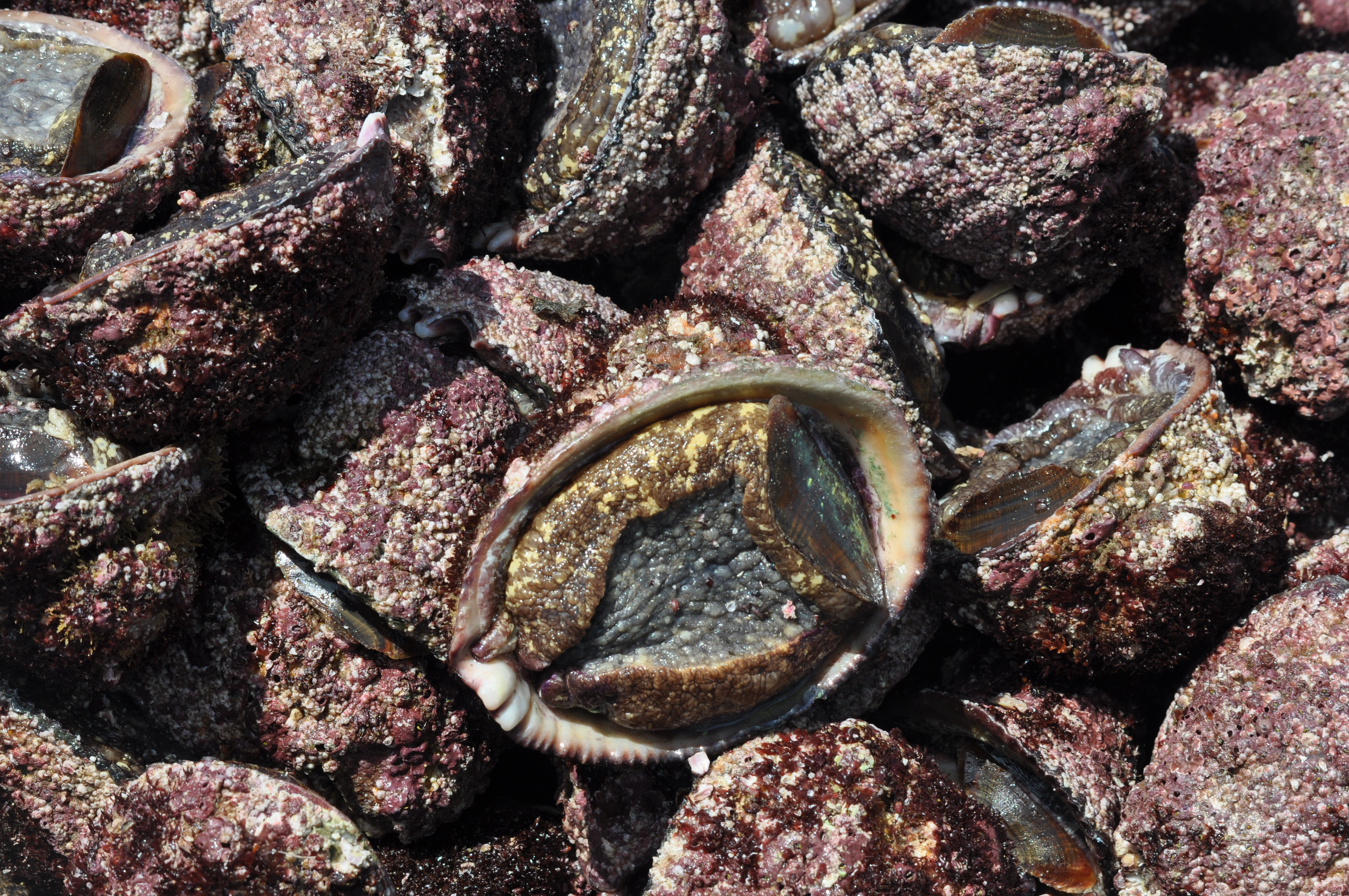 Concholepas concholepas (locos) aún vivos, en un bote de pesca artesanal en Los Molles, Chile.